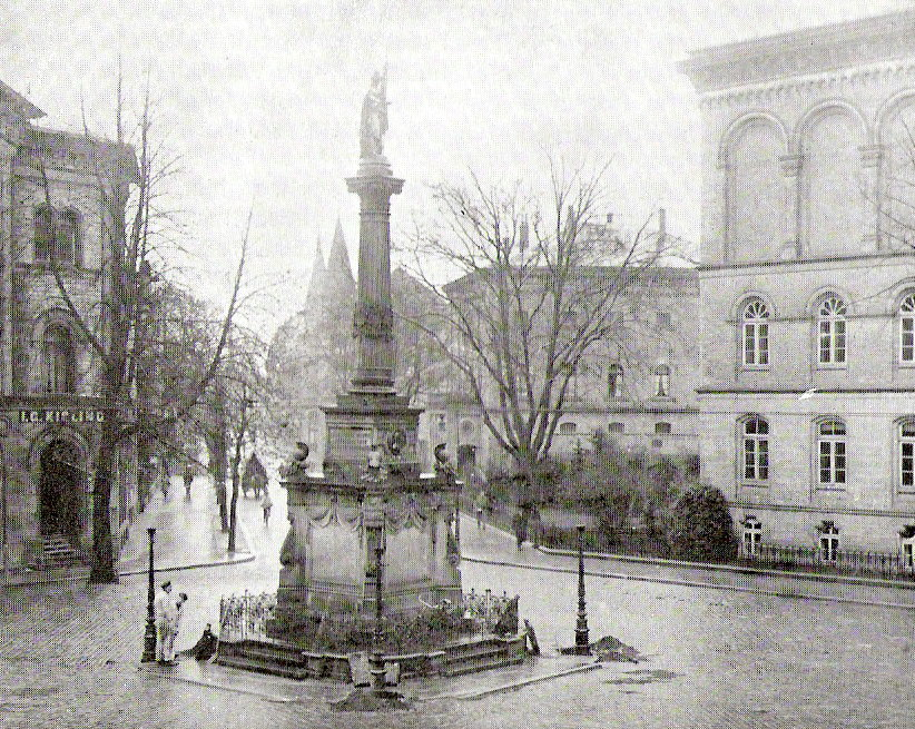 alte Stadthalle in Osnabrück ca. 1928 (im Hintergrund vom Neumarkt gesehen)